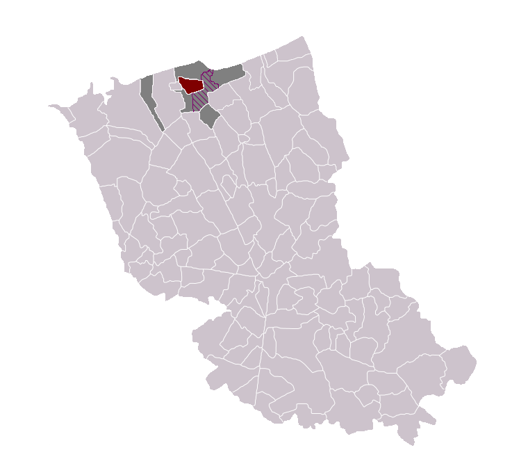 Saint-Pol-sur-Mer dans le canton de Dunkerque Ouest